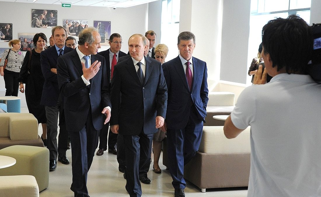 Президент Путин и члены делегации МОК на открытии Российского международного олимпийского университета 16 сентября 2013 года